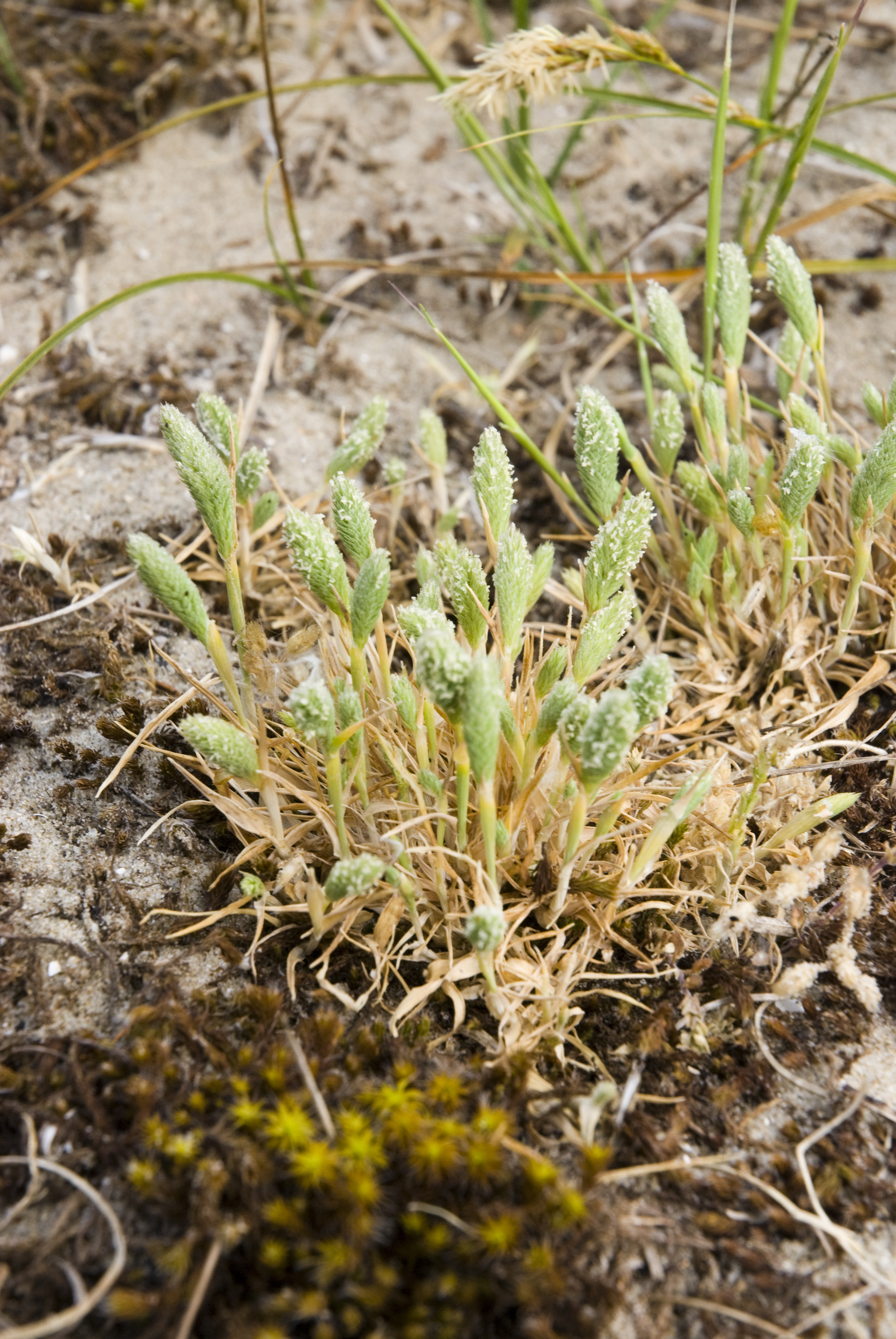 Phleum arenarium Sentier de la découverte à Fort-Mahon-Plage (Somme, France).